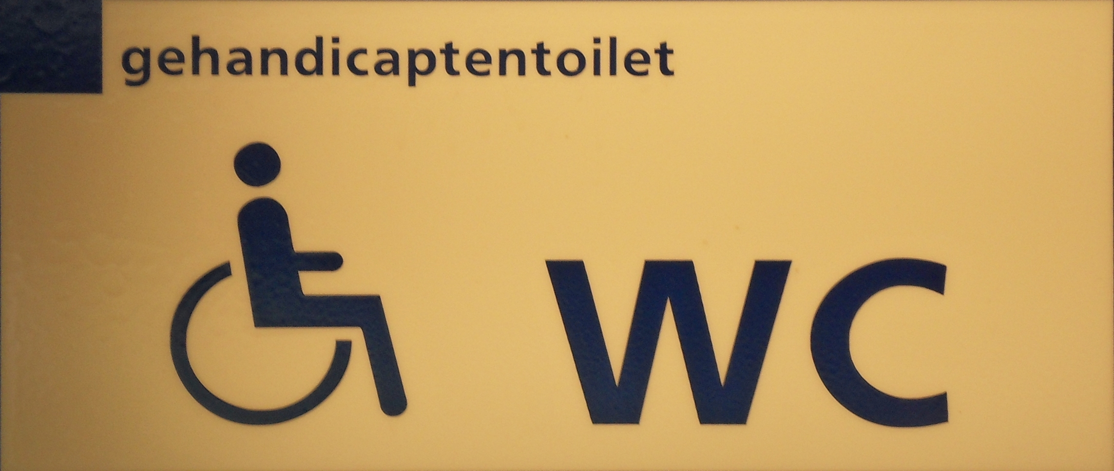 Het symbool van een toilet voor rolstoelgebruikers. Station Amersfoort.